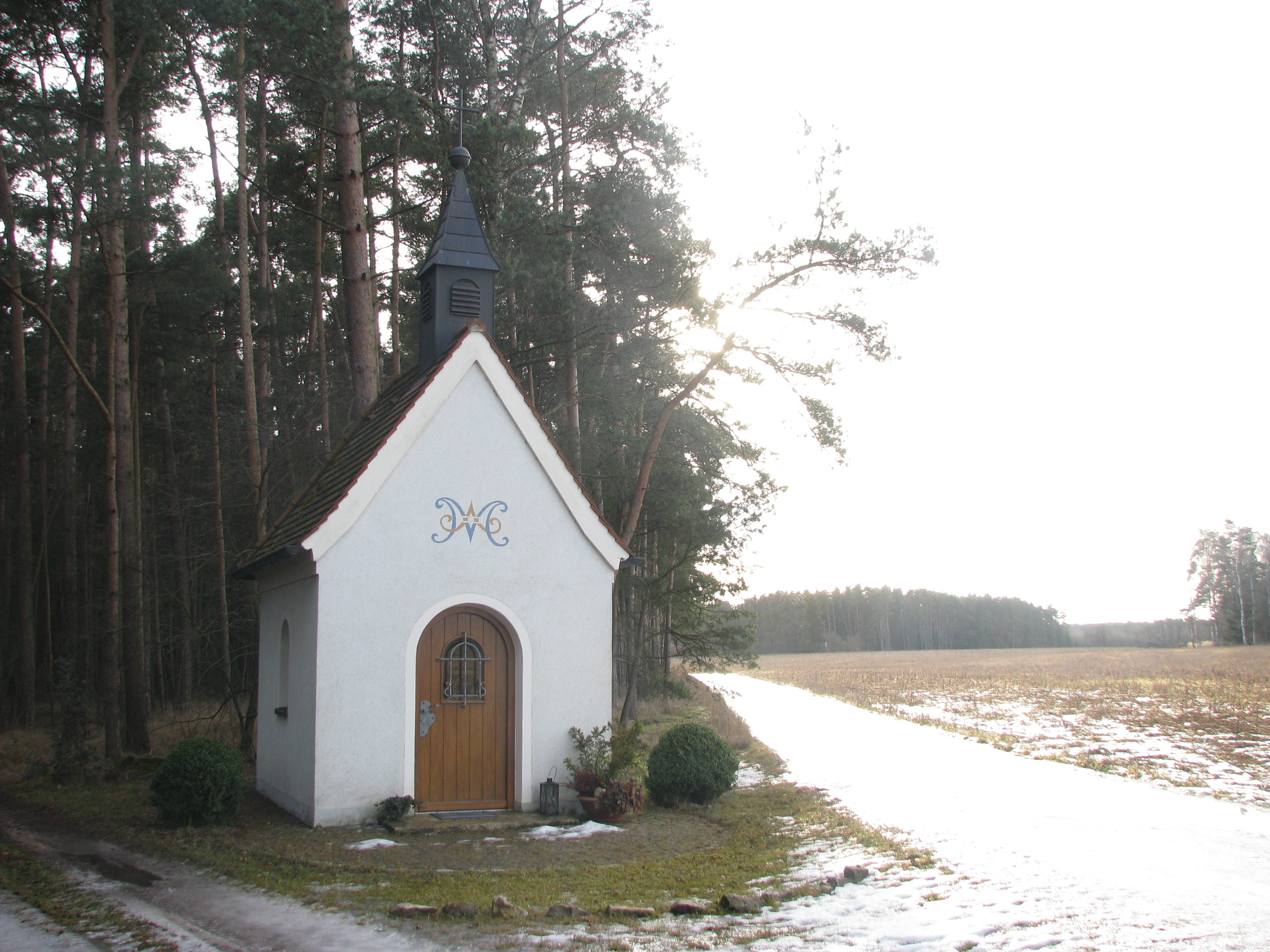 Kapelle zur Hl. Familie bei der Schlierfermühle, Ortsteil von Sengenthal im Landkreis Neumarkt in der Oberpfalz